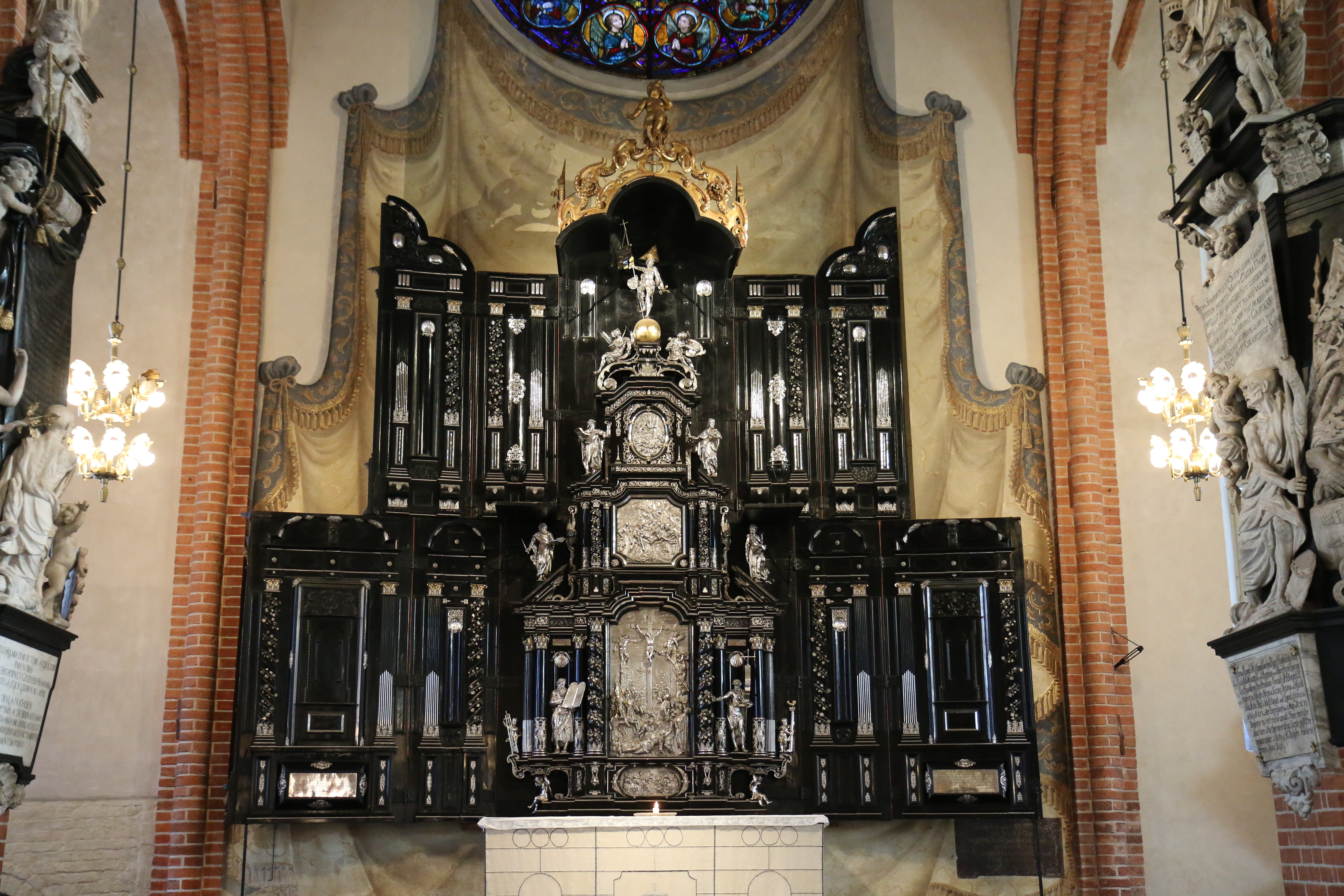 Altertavla i Storkyrkan.